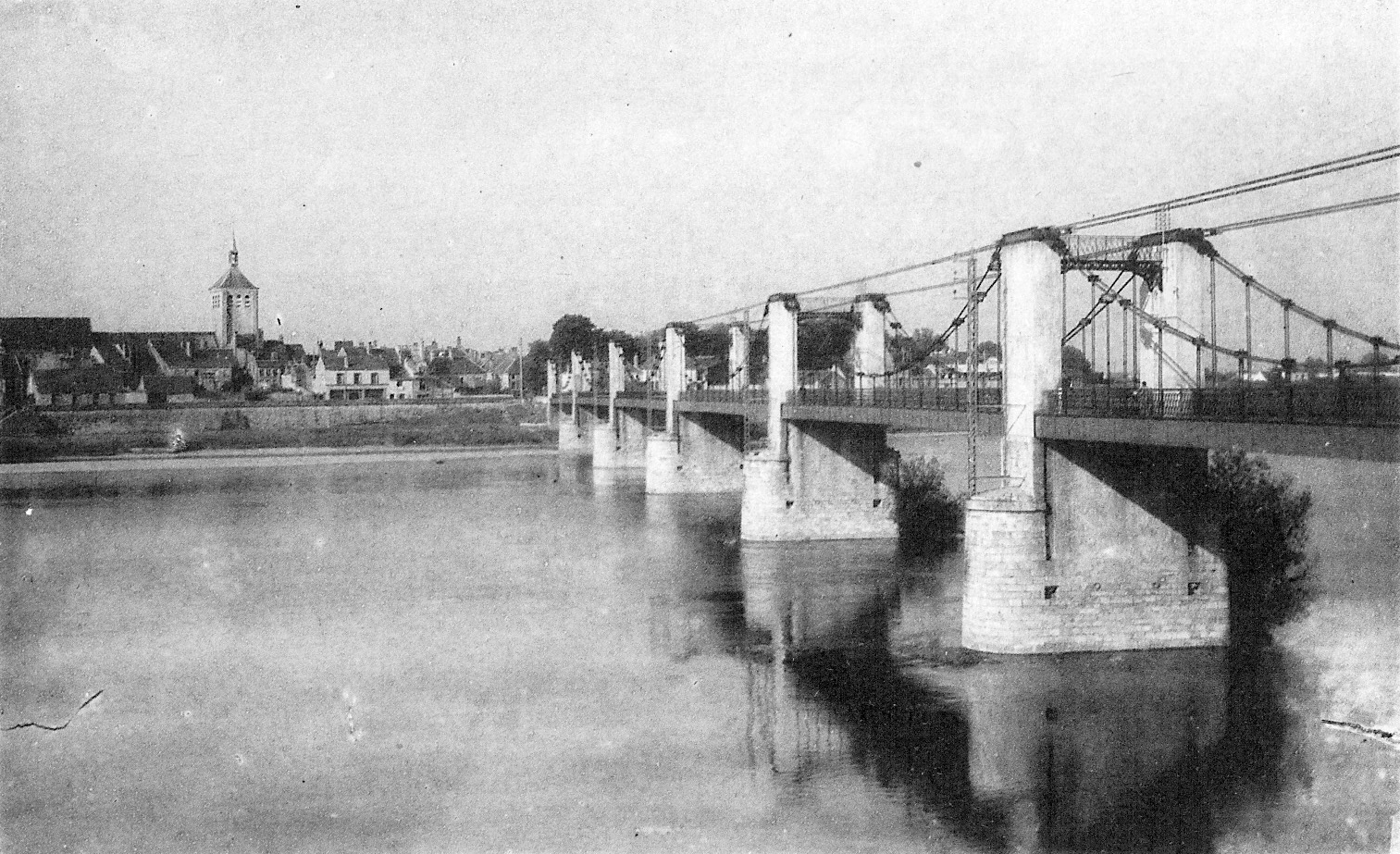 Le pont suspendu et la ville de Jargeau (Loiret, France), depuis la rive droite de la Loire